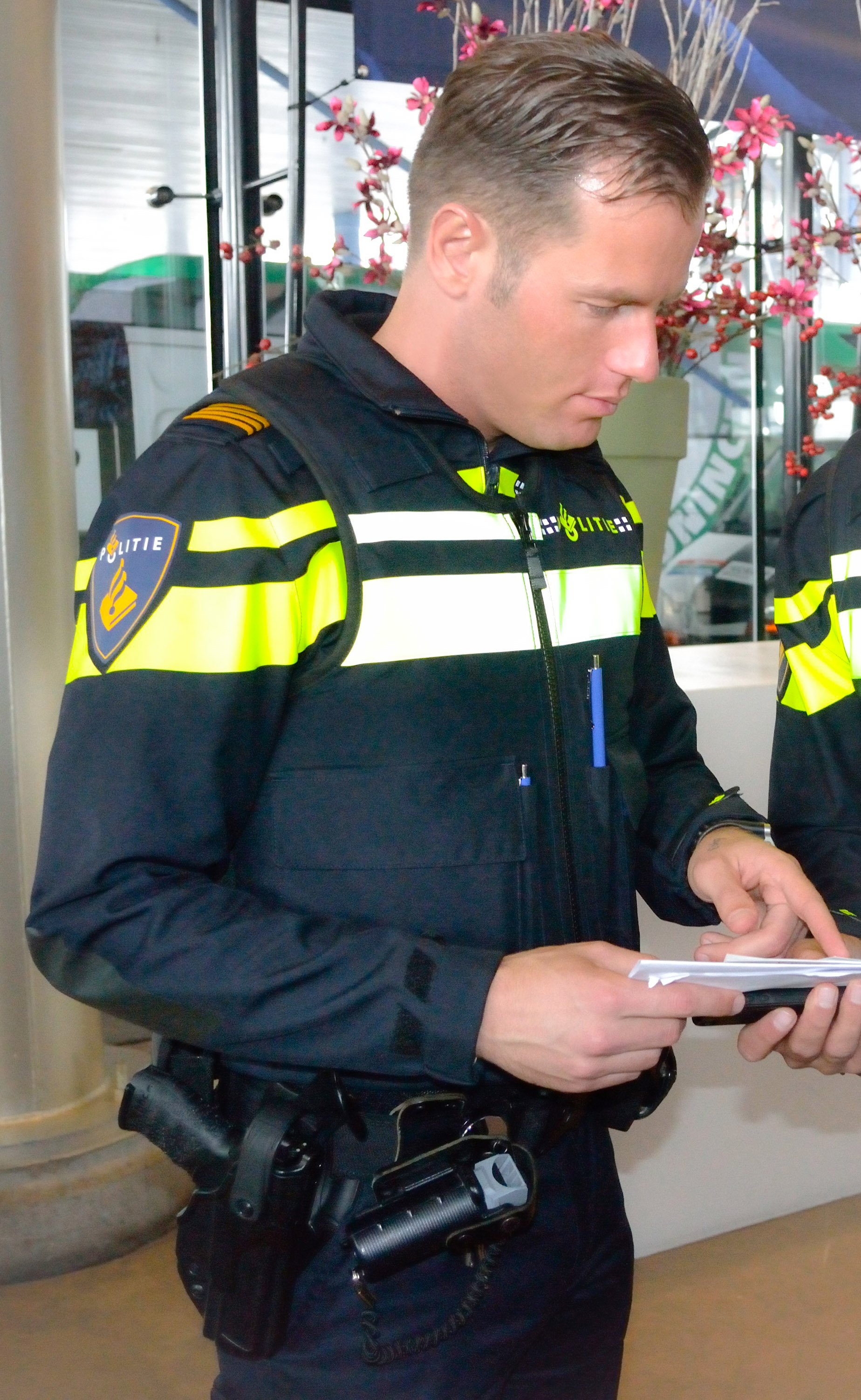 Danny Makkelie in politieuniform